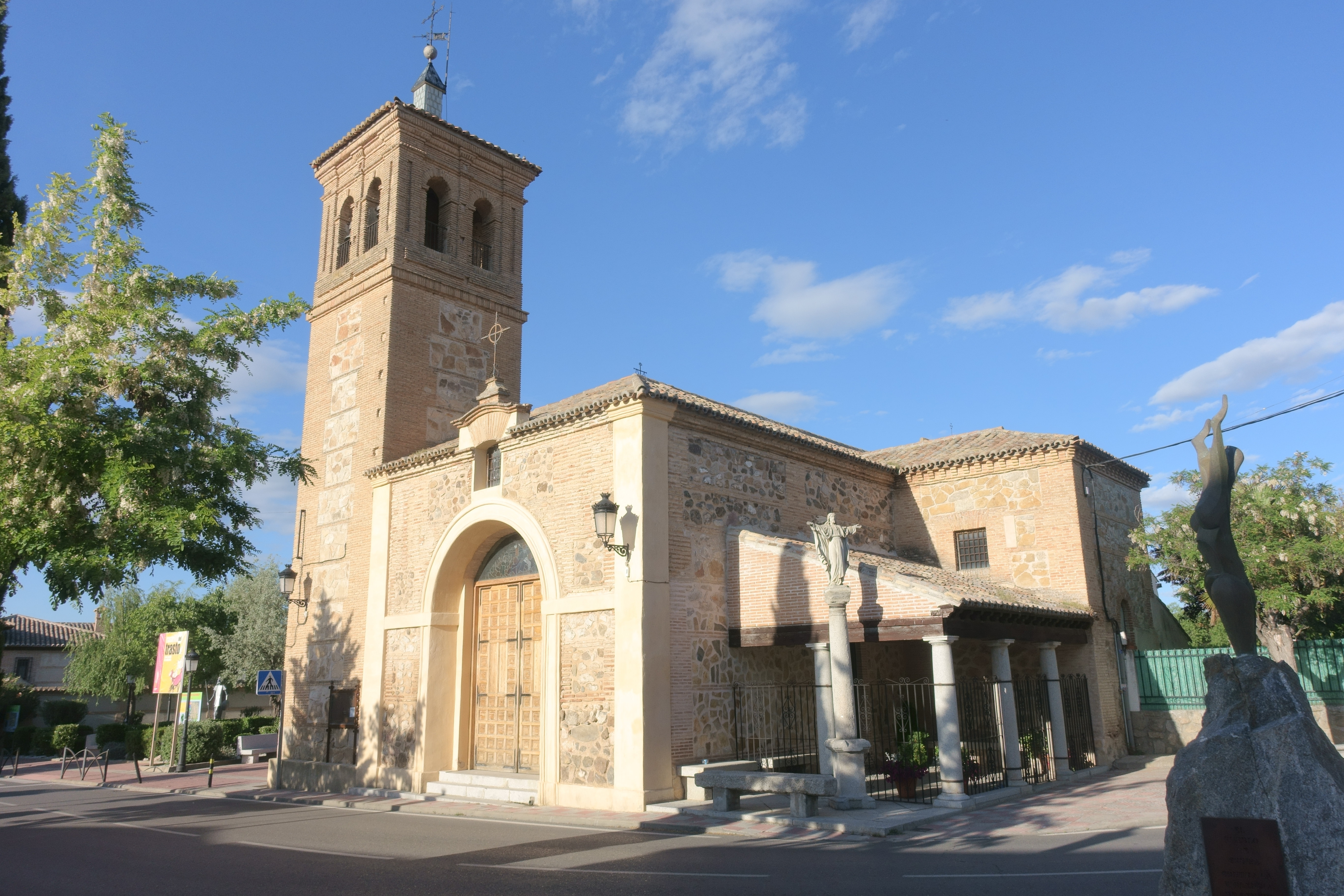 Iglesia de San Felipe y Santiago Apóstoles en Cobisa (Toledo, España).